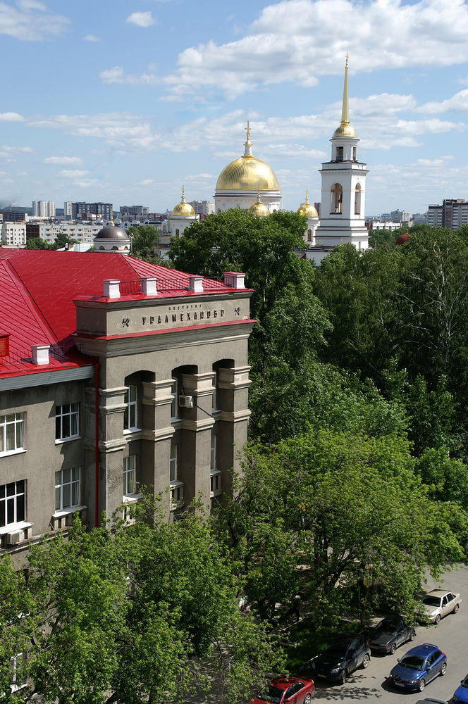 Главное здание института "Уралмеханобр"